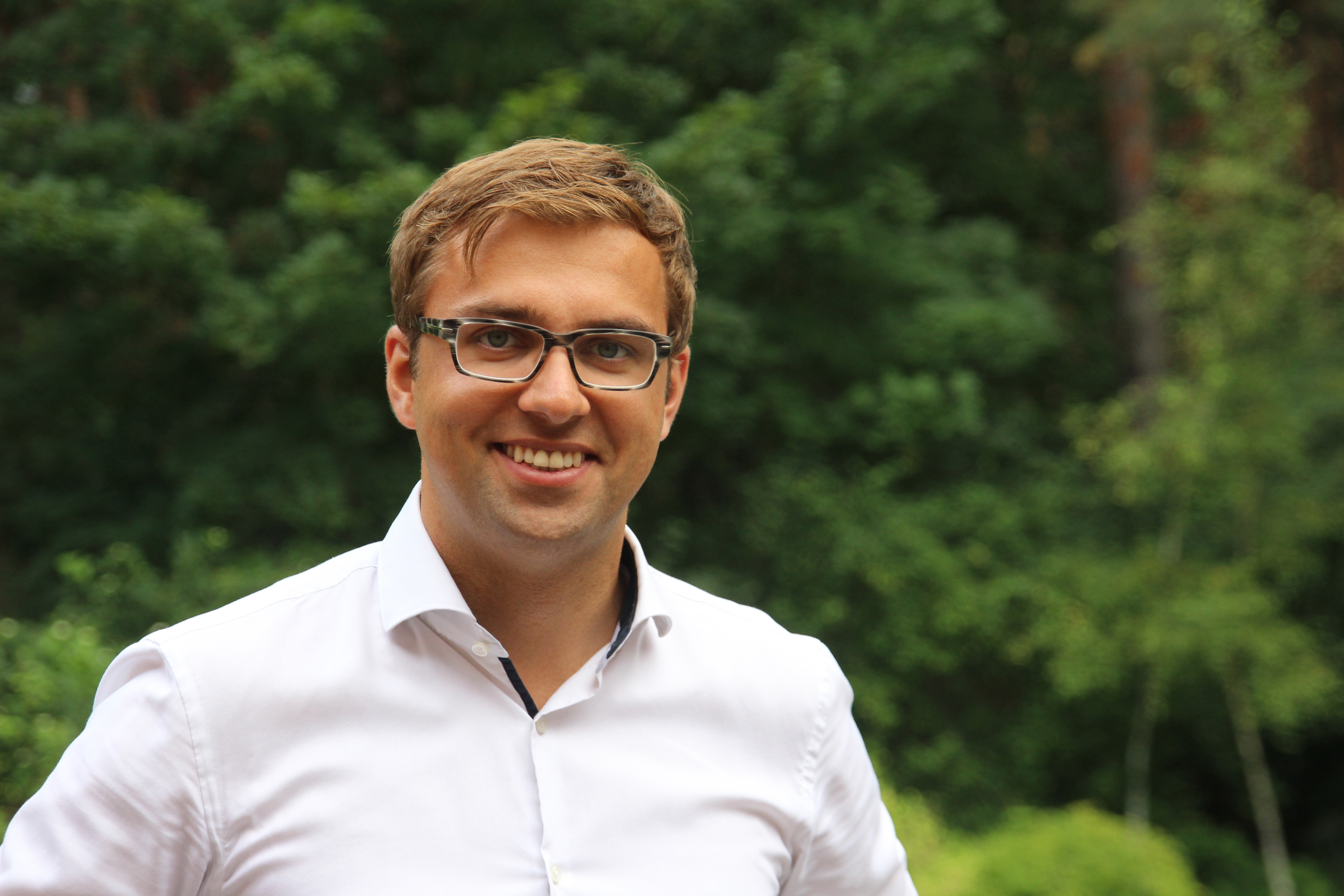 Erik Stohn, Abgeordneter des brandenburgischen Landtages.